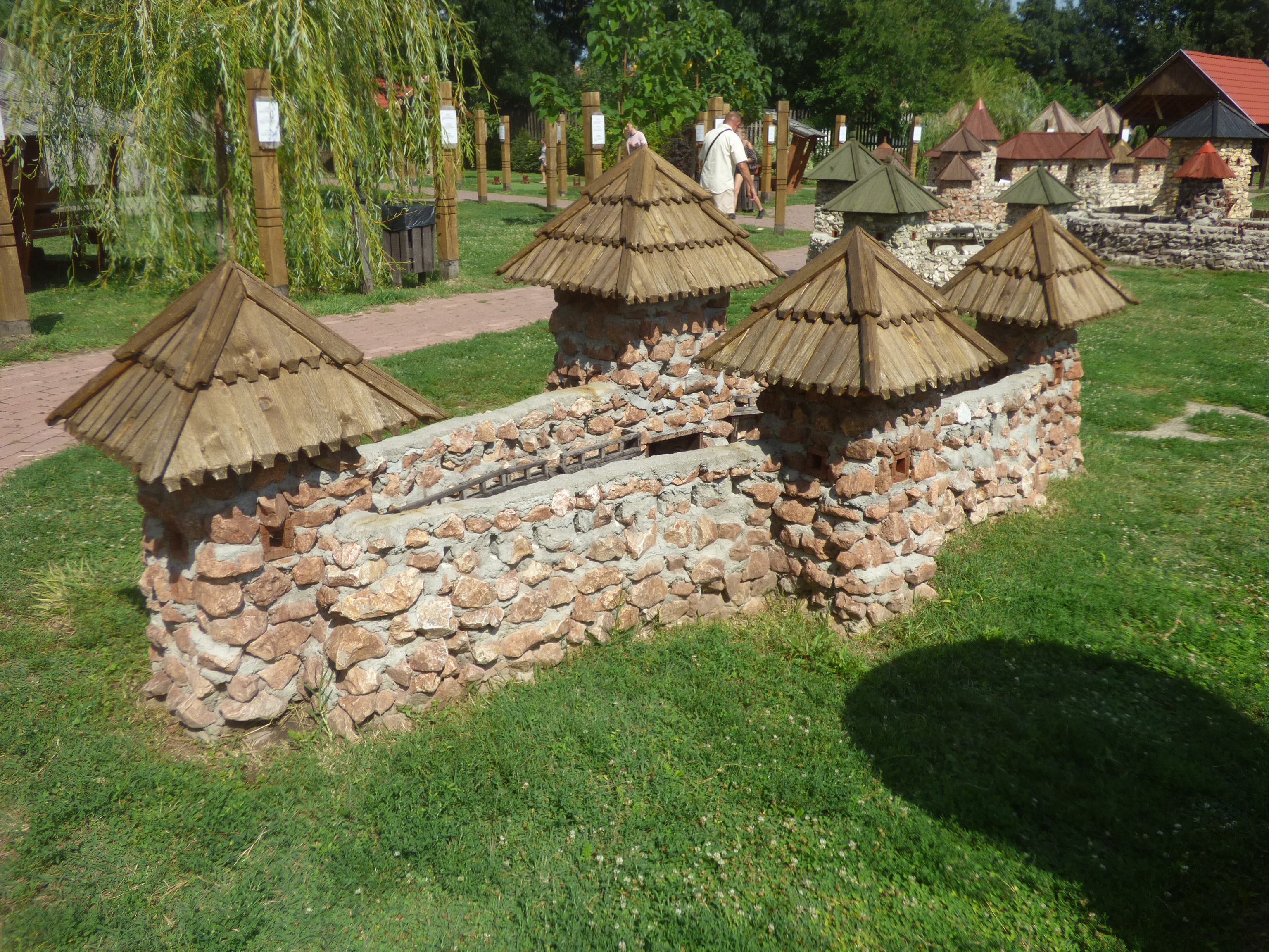 Földvár várának (Barcaföldvár) makettje a dinnyési Várparkban